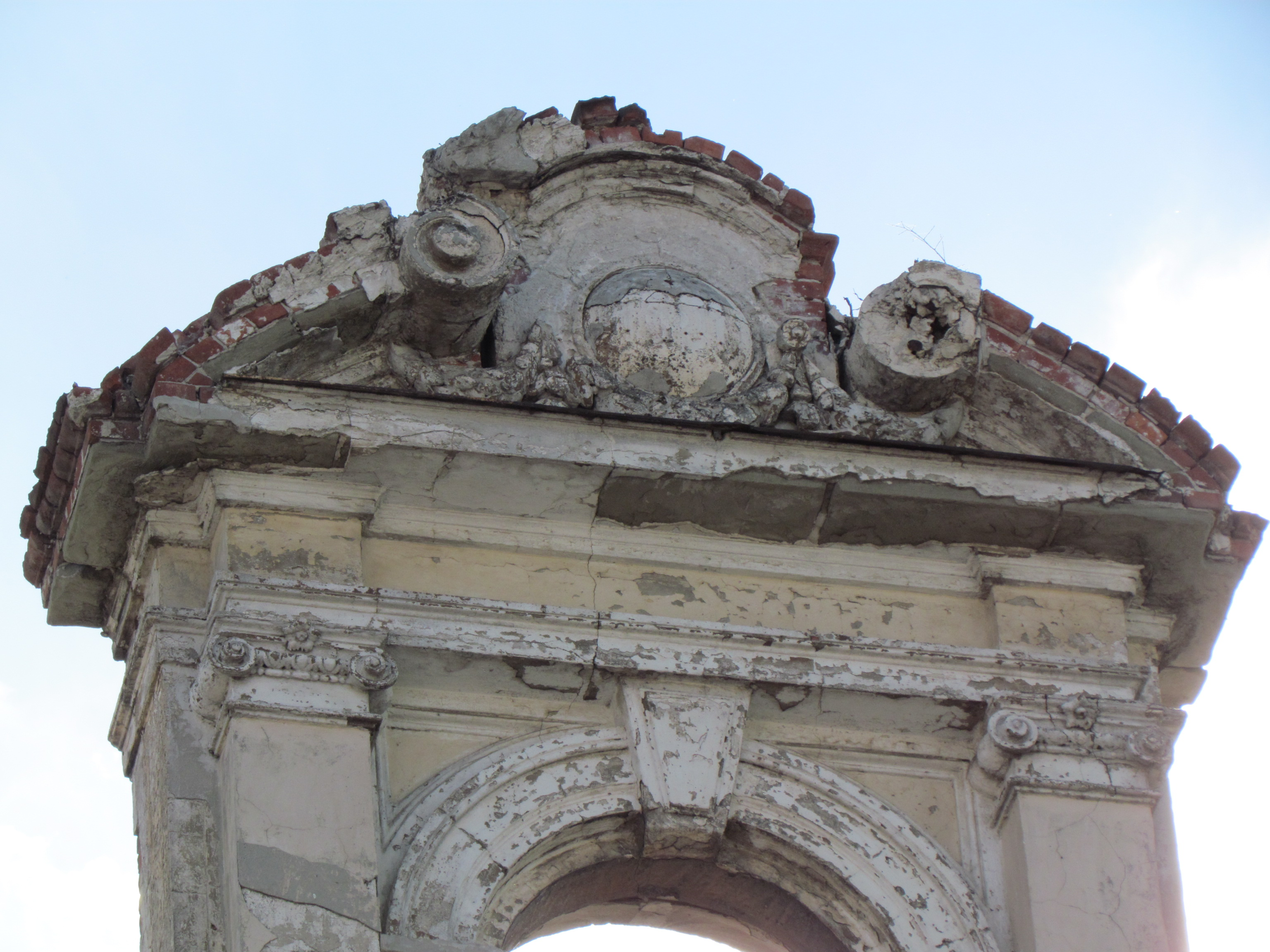 Україна, Харків, вул. Полтавський Шлях, 35